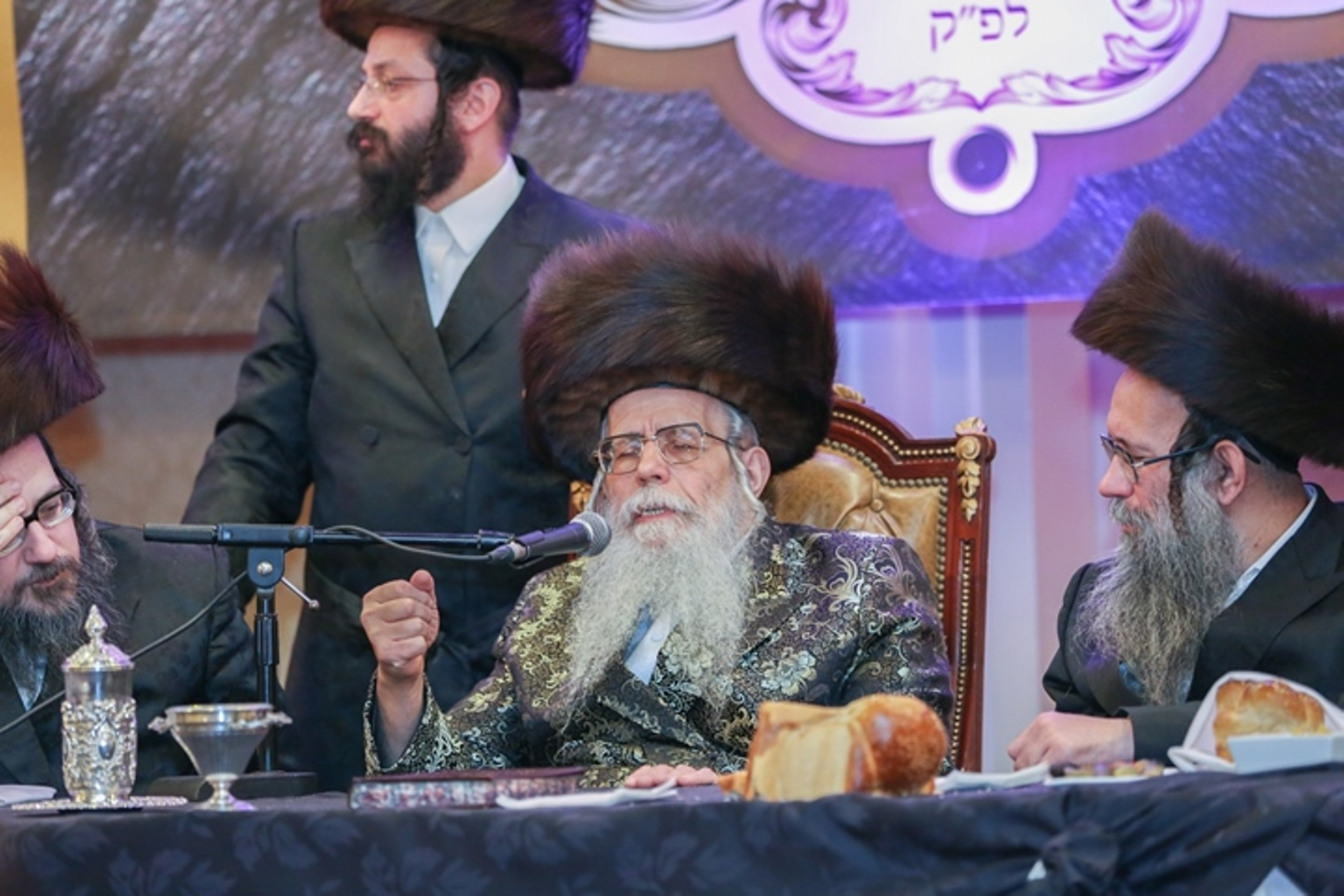 האדמו"ר מדינוב בדברות קודש